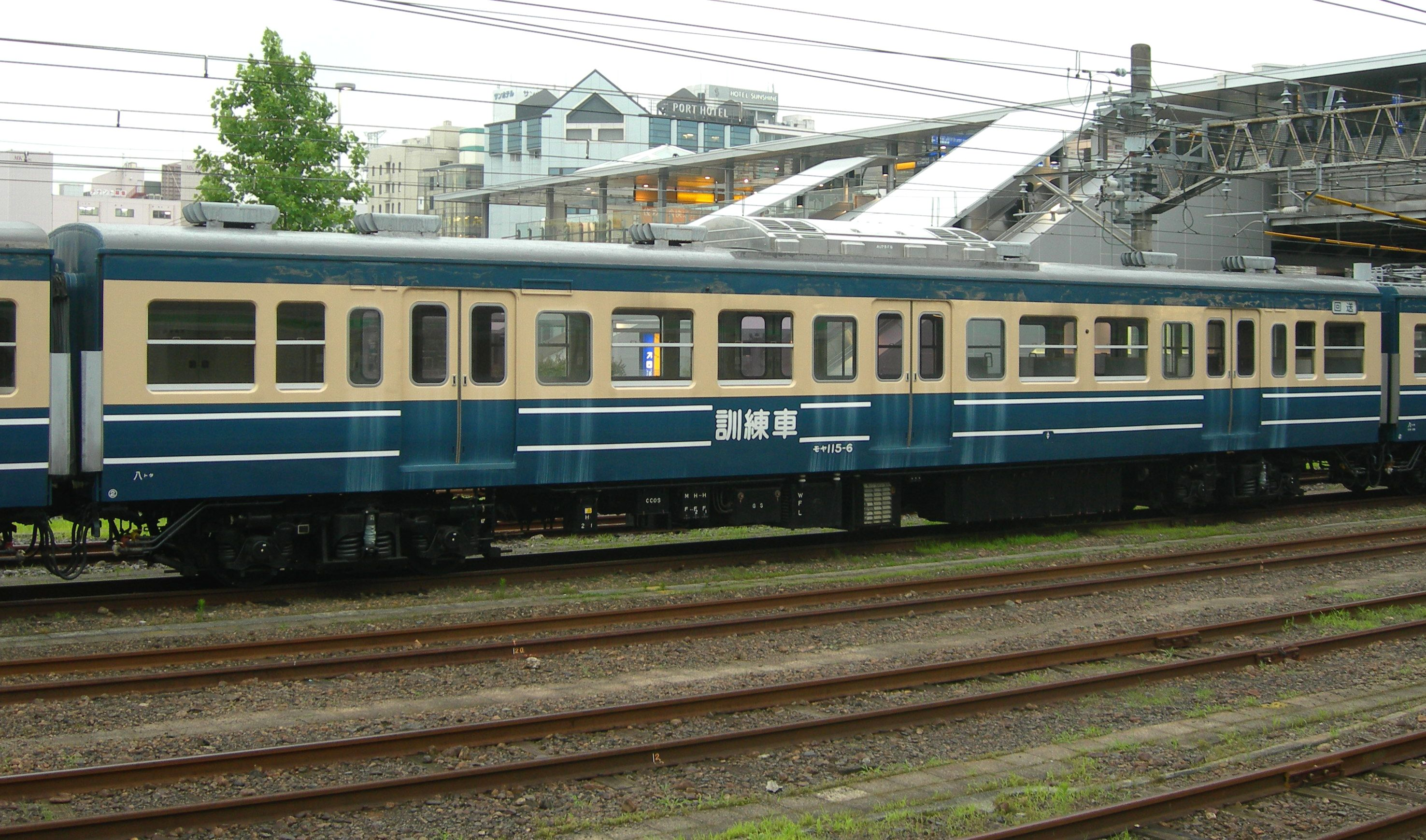 JR東日本 115系、モヤ115-6 宇都宮駅で撮影